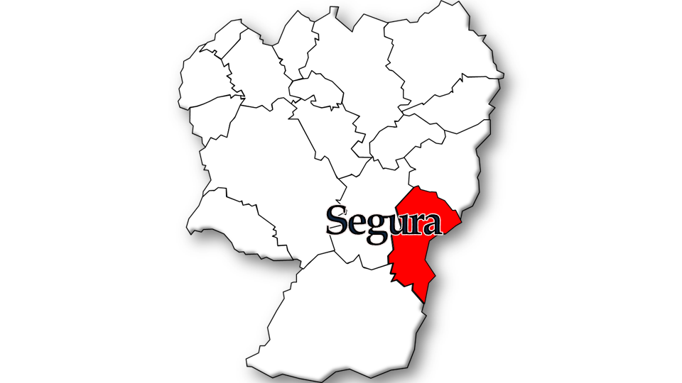 População